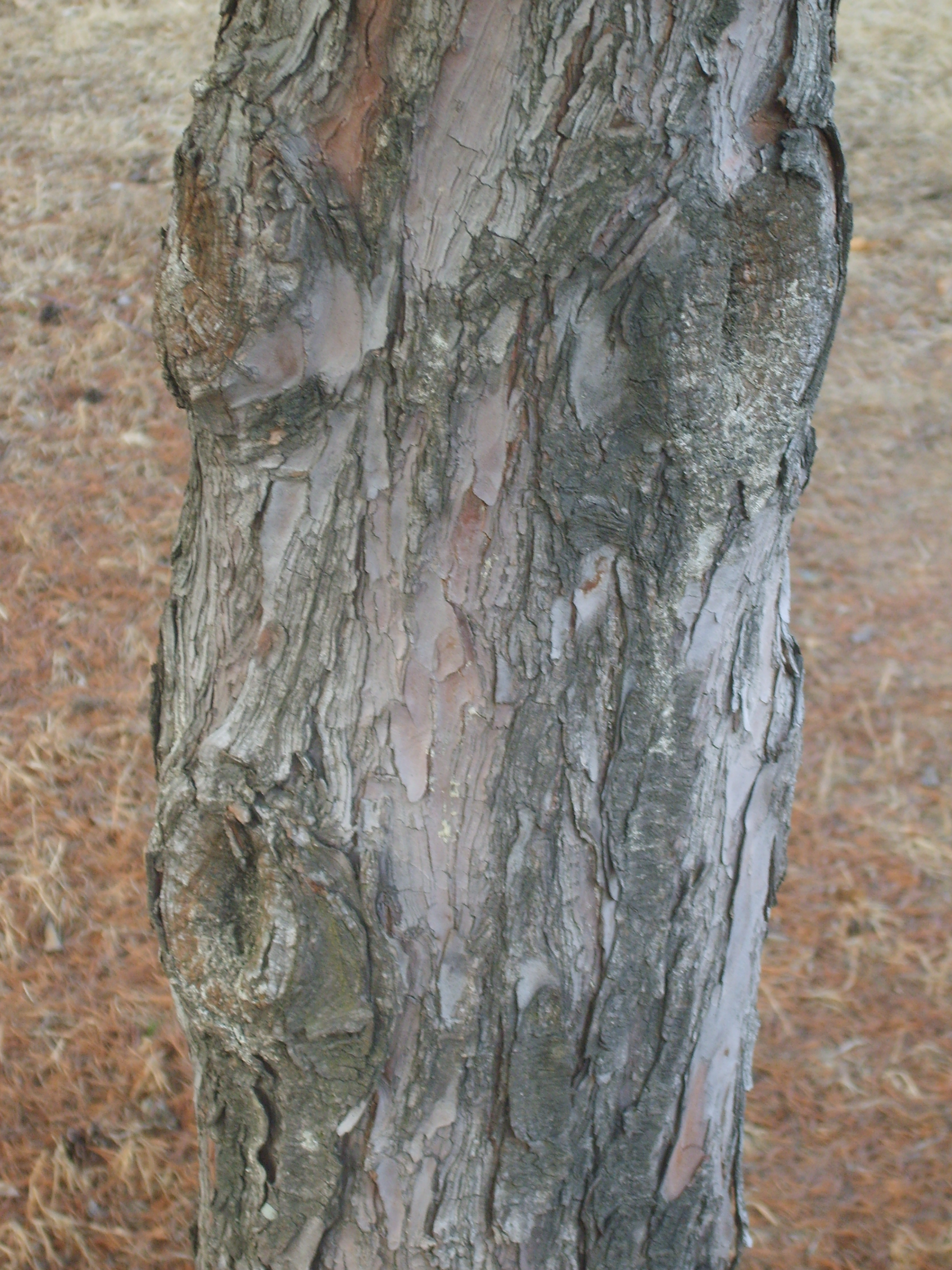 Pinus parviflora_bark. Gwangju Korea. 광주 북구 중외공원에서 찍음. 섬잣나무 줄기.